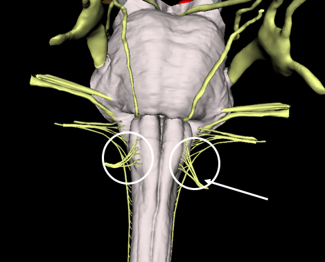 Hipogloso nerbioaren erroak erraboileko aurre-alboko ildotik ateratzen dira fusionatuz nerbio bakarra osatzeko.